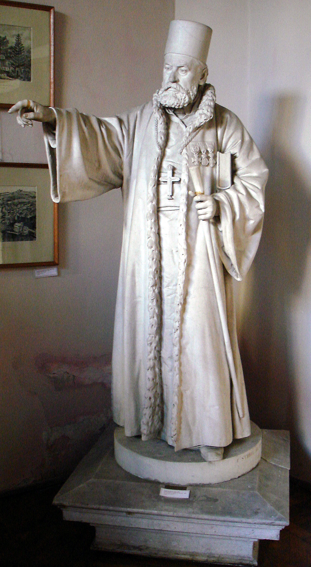 Statuia de marmură a protopopului Teodor Economu, ronde-bosse în marmură, 187 x 82 x 94 cm, semnat și datat pe postament în față: C. Storck fec. 1884, inventar 9151390. Ea a fost realizată de sculptorul Karl Storck. Transpunerea în marmură a fost făcută de fiul său, Carl Storck. Statuia este expusă la Muzeul de Artă Frederic Storck și Cecilia Cuțescu-Storck.